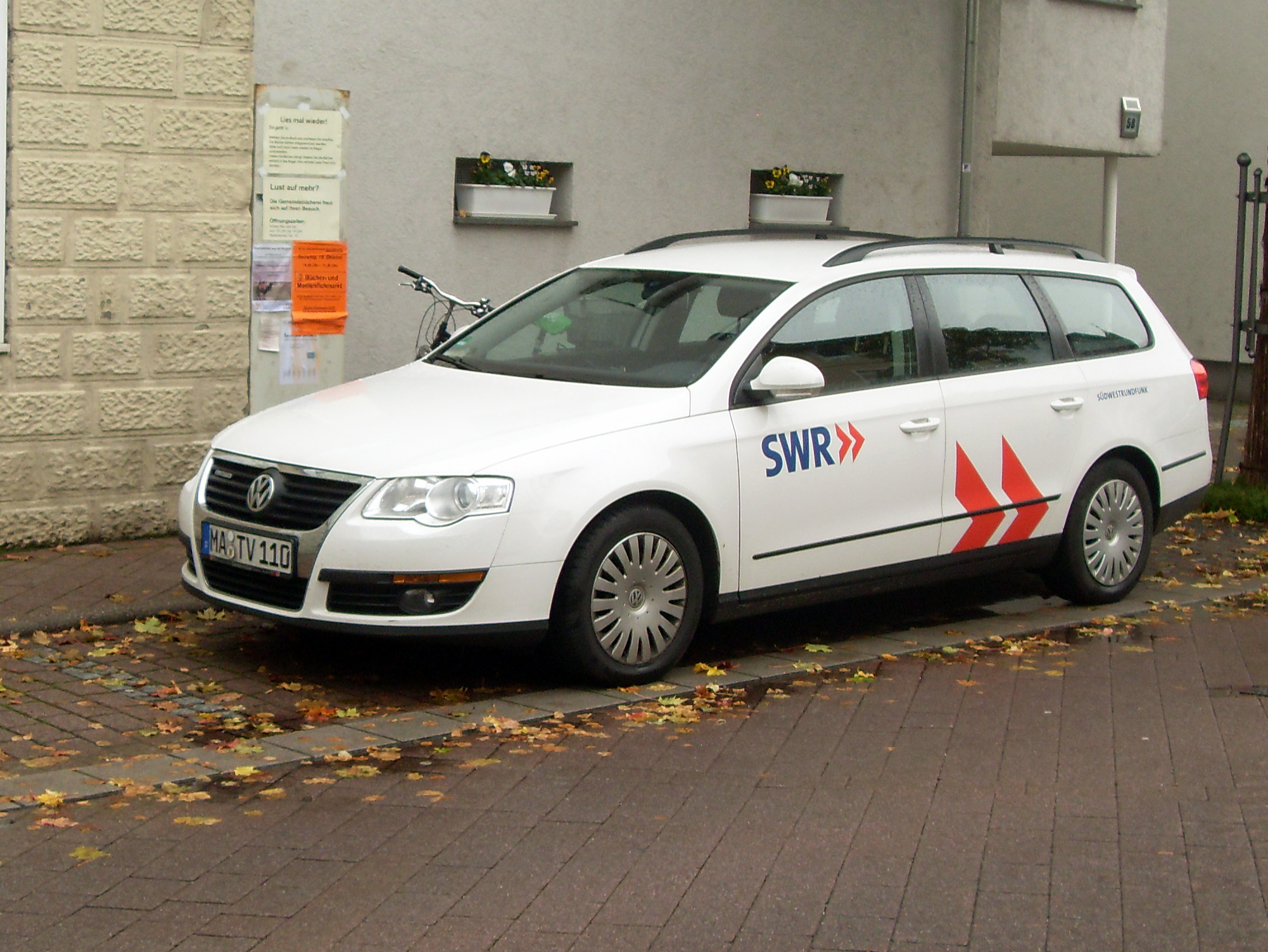 Volkswagen Passat B6 SWR4 w Bammentalu